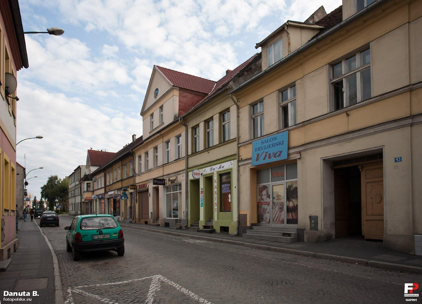 Zachowany wyjątkowo długi odcinek zwartej zabudowy. Ul. Kościuszki, widok w kierunku południowym, czyli w stronę rynku.